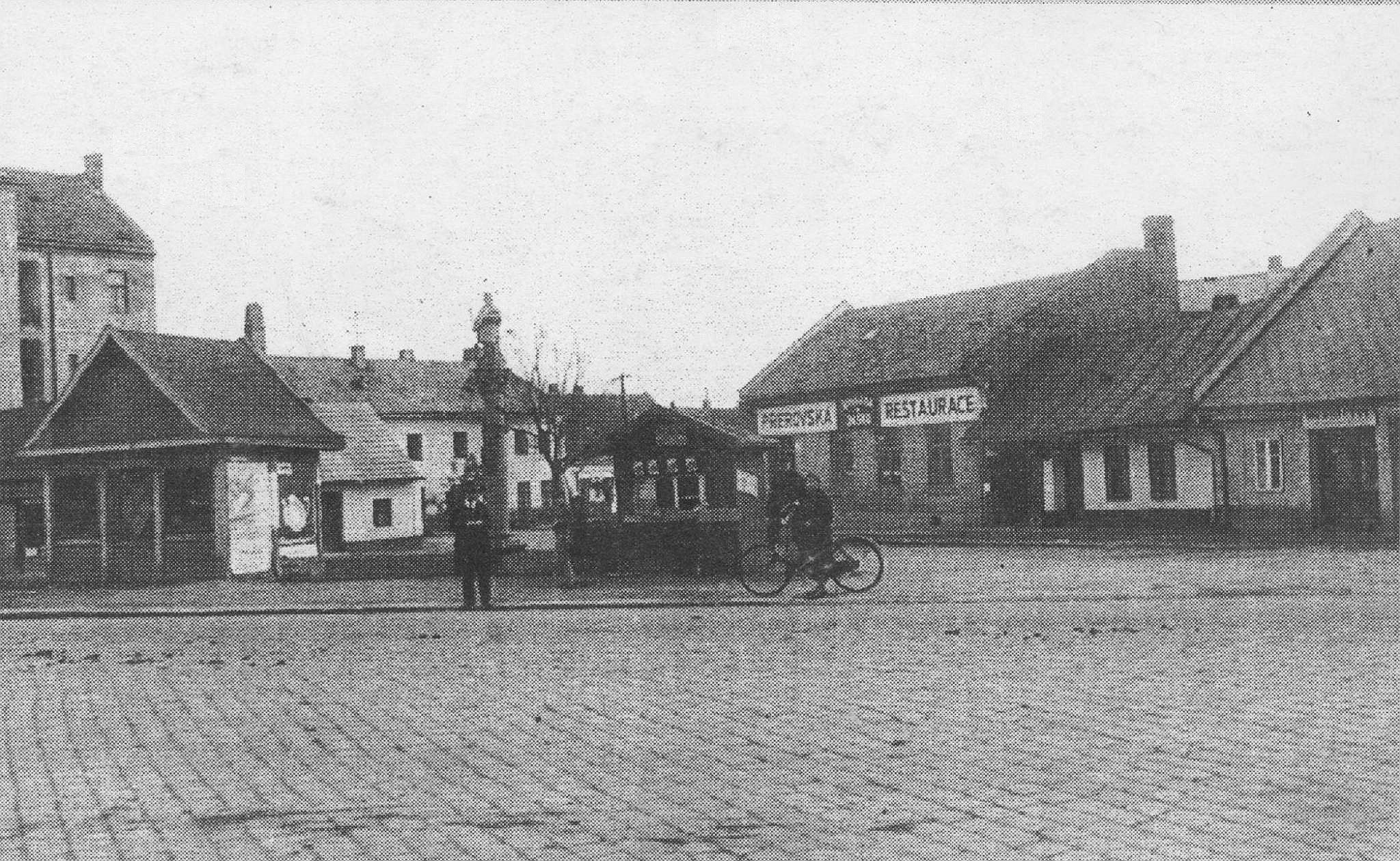 Sloup se sochou svatého Jana Nepomuckého, u mostu, pp. 3117/5, Kroměříž. Původní umístění sloupu na náměstíčku Bělidel.